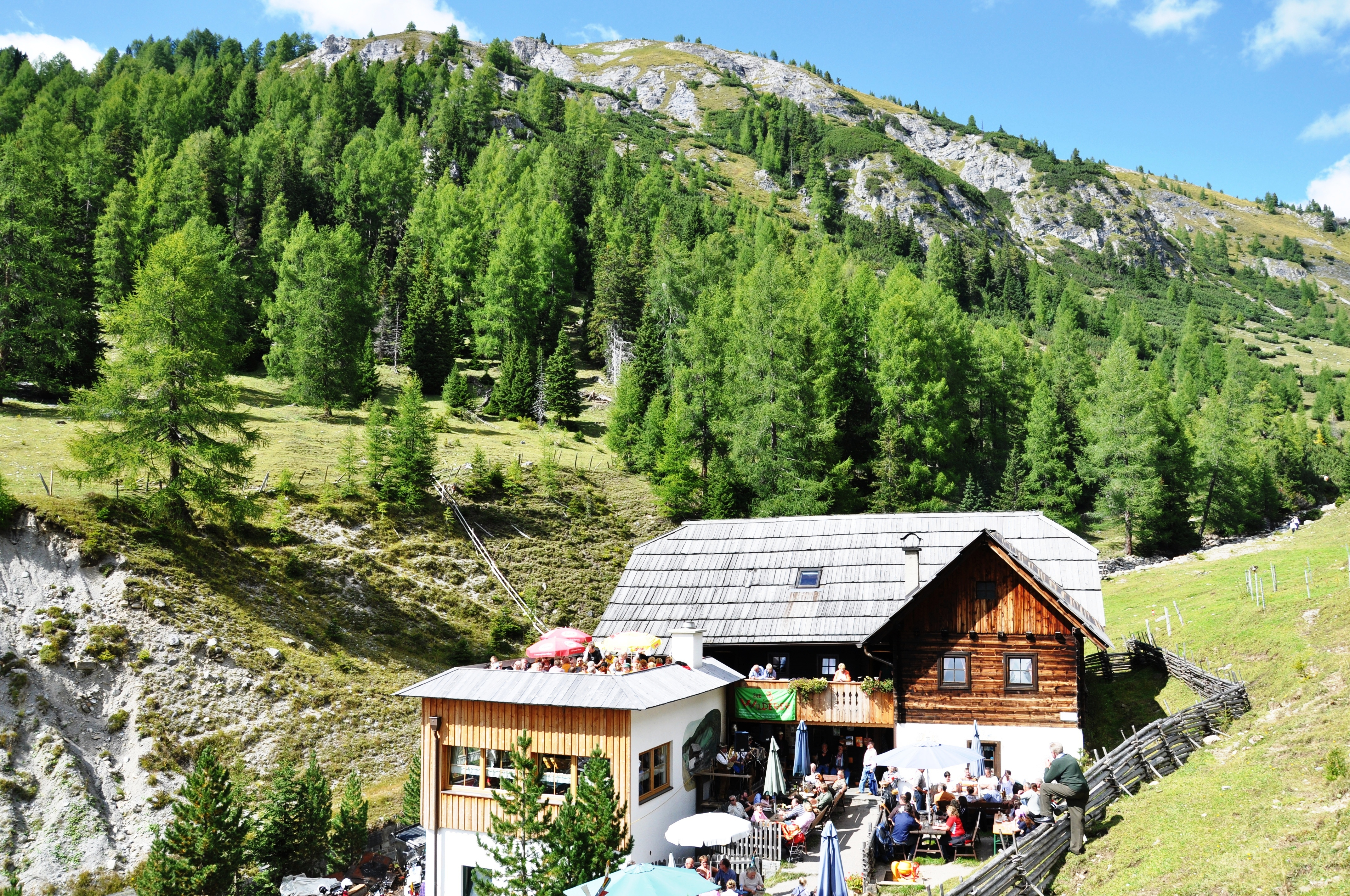 Bauernbad an der Nockalmstrasse